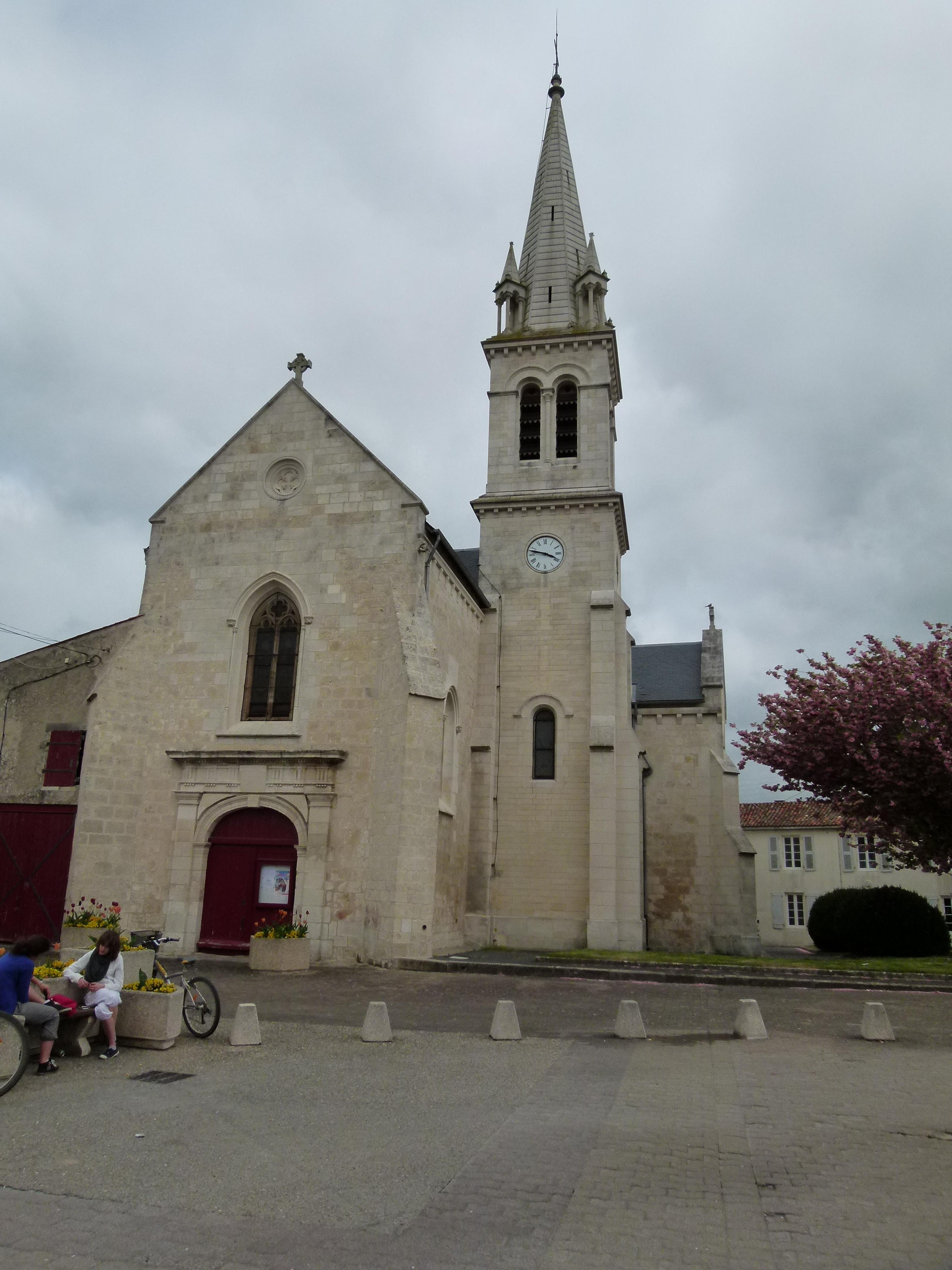 L'église d'Aigrefeuille-d'Aunis